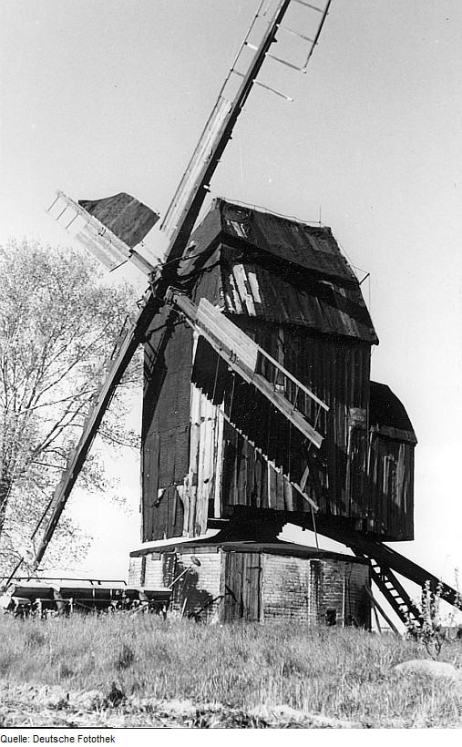 Original image description from the Deutsche Fotothek Insel-Tornau. Bockmühle, Baujahr 1837